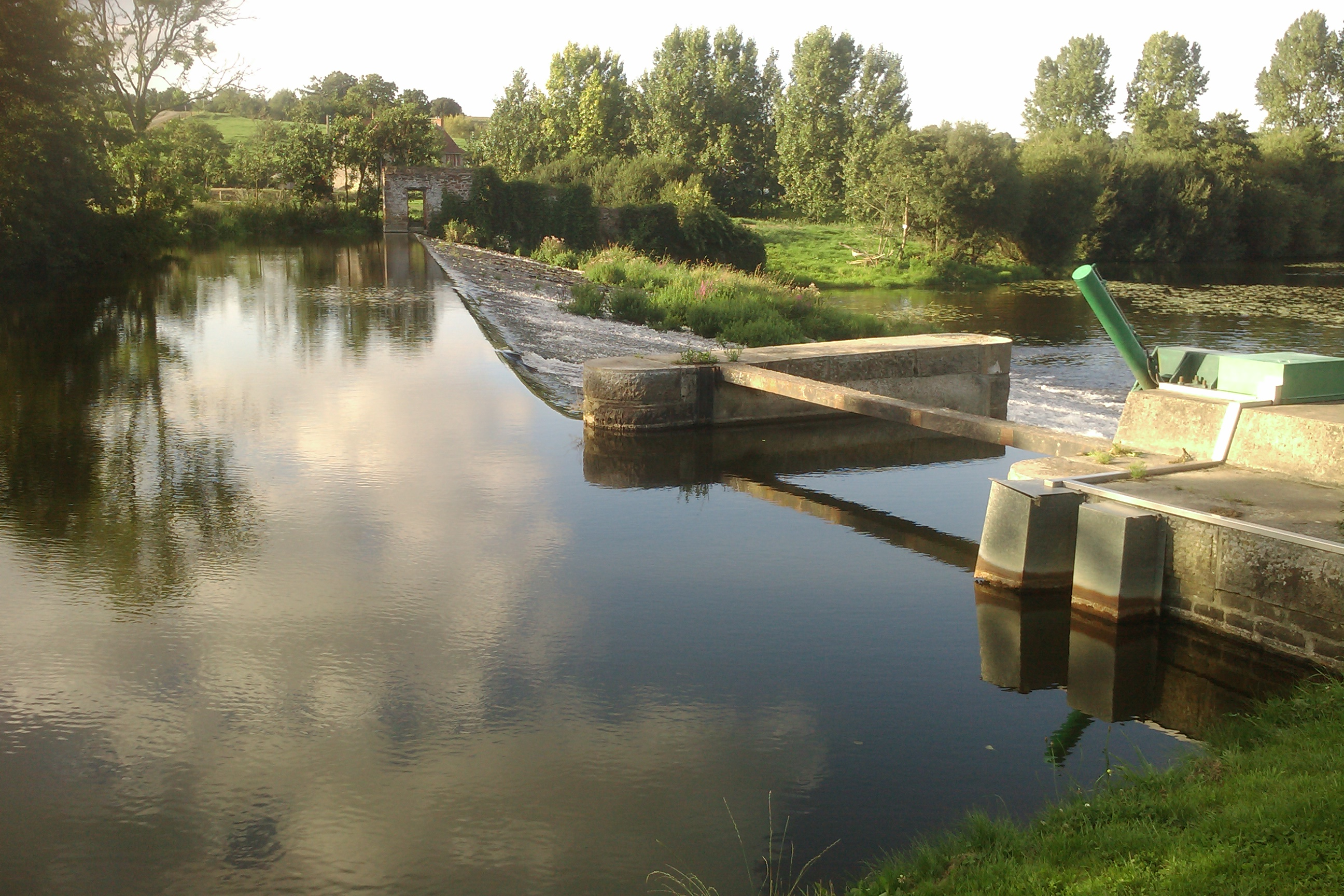 les Claies de Vire, situé sur la commune de La Meauffe